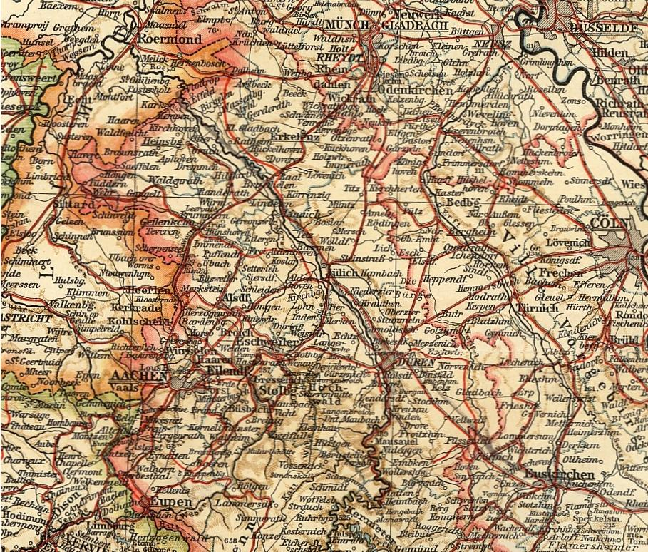 Karte des Abschnitts der Rurfront